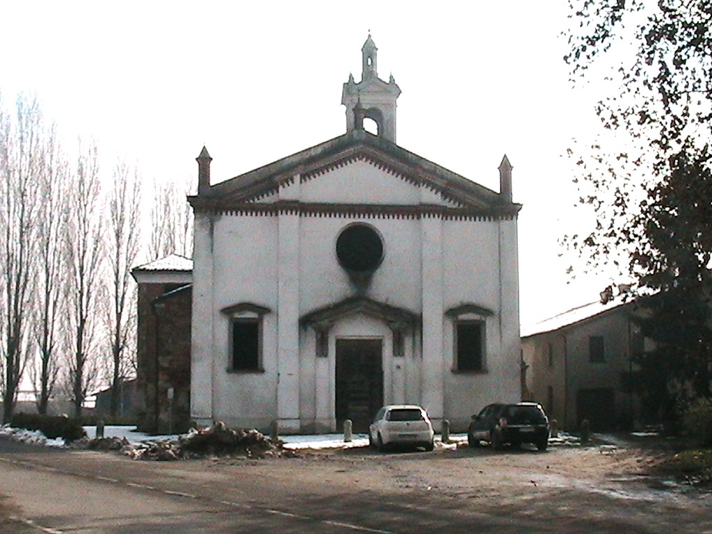 San Giovanni in Croce - Chiesa di San Zavedro